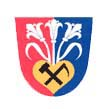 Česky: znak obce Výkleky